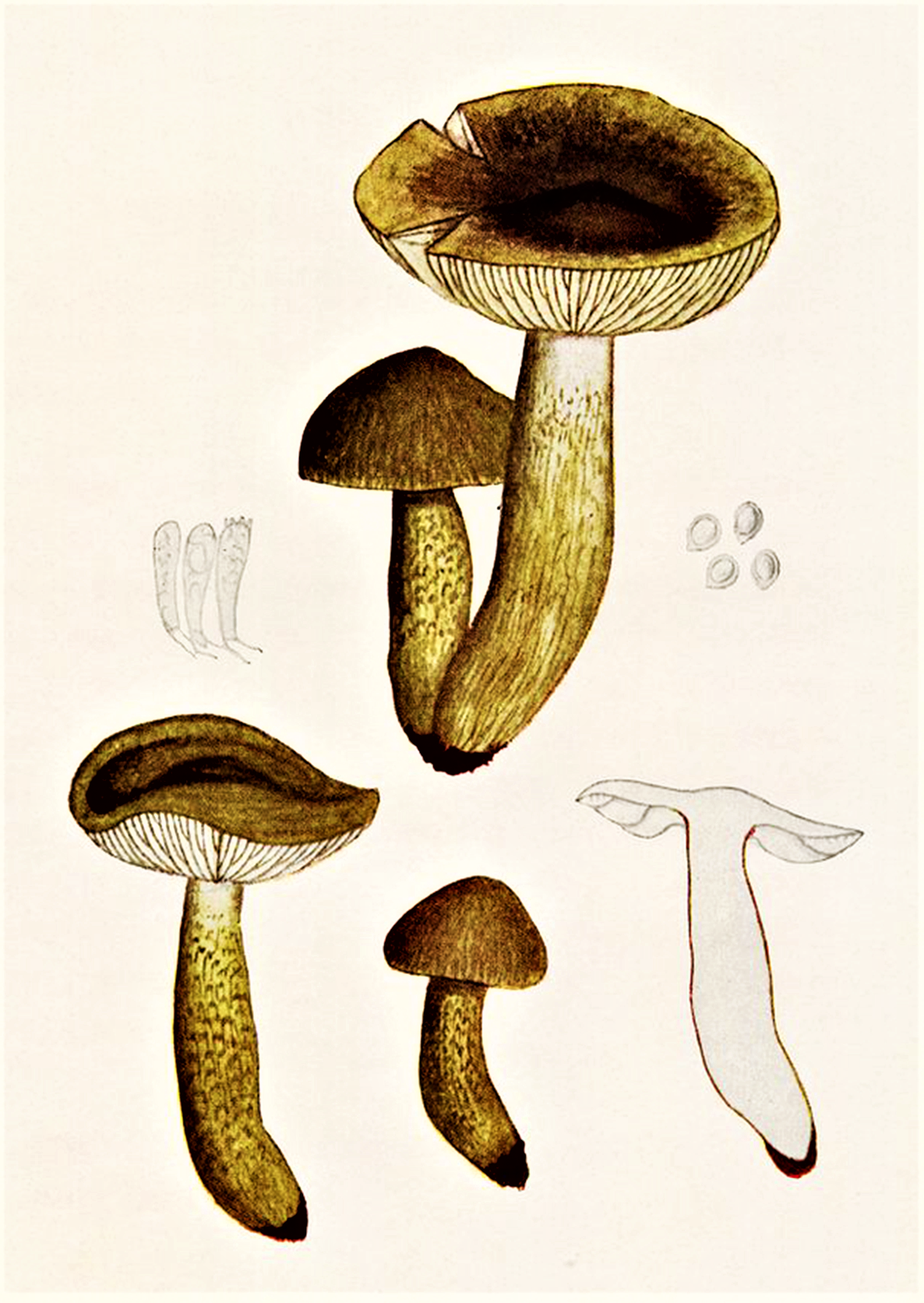 Bres.: Tricholoma fucatum (Fr., 1821) P.Kumm. (1871)